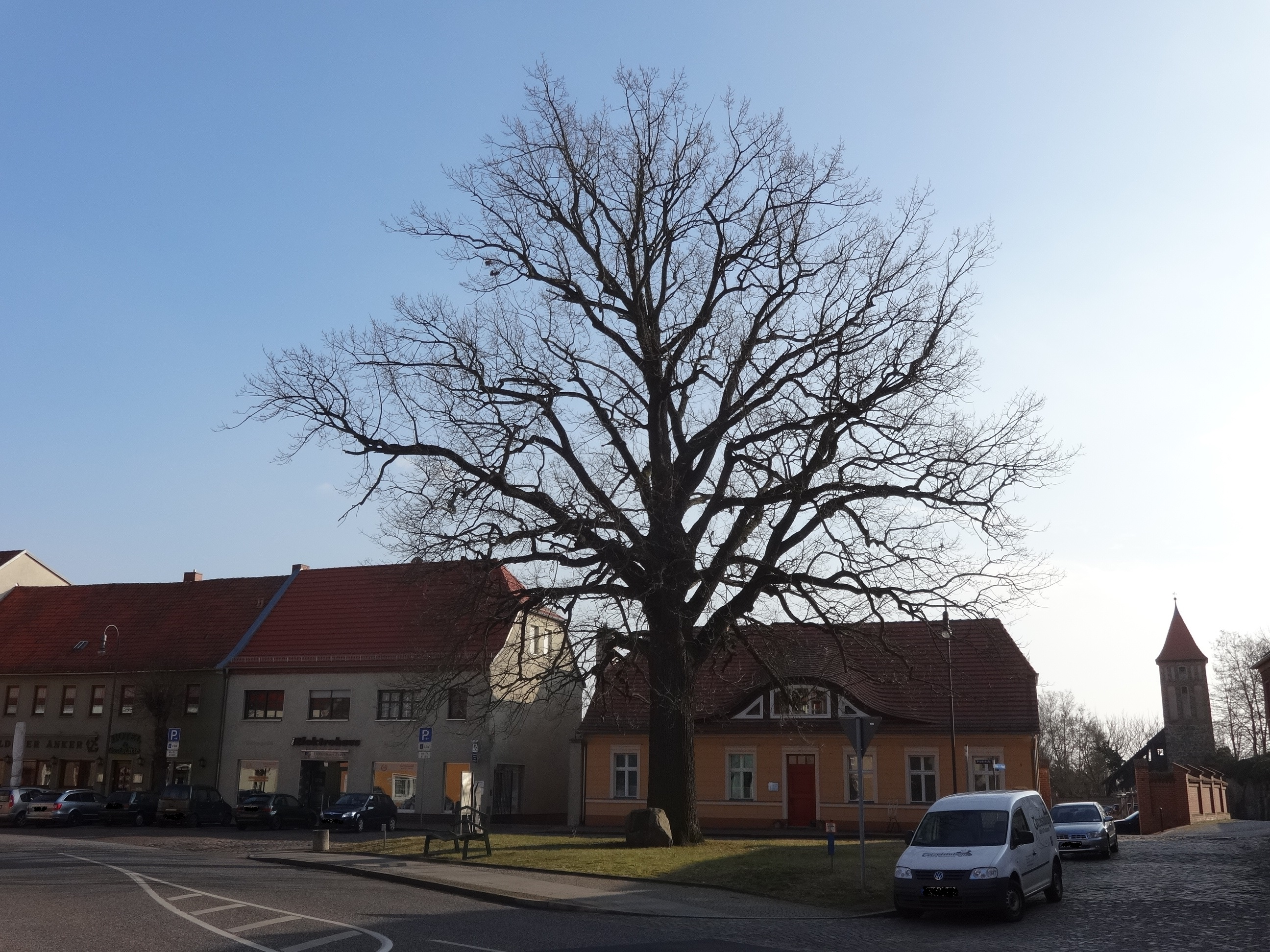 Auf dem heutigen Heilig-Geist-Platz befand sich bis zum Ende des 19. Jahrhunderts die Heilig-Geist-Kapelle aus dem 12. Jahrhundert. Heute prägt eine Luthereiche sowie ein Gedenkstein für einen Pastor den Platz.